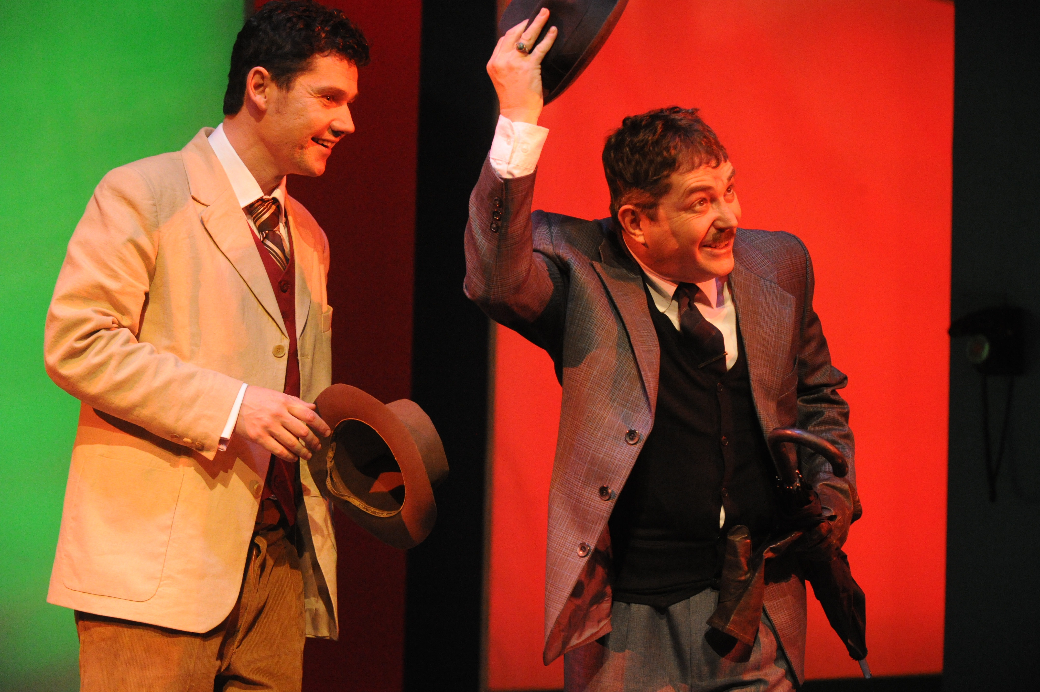 ערן איווניר ואבי גרייניק בהצגה הארווי, תיאטרון גשר